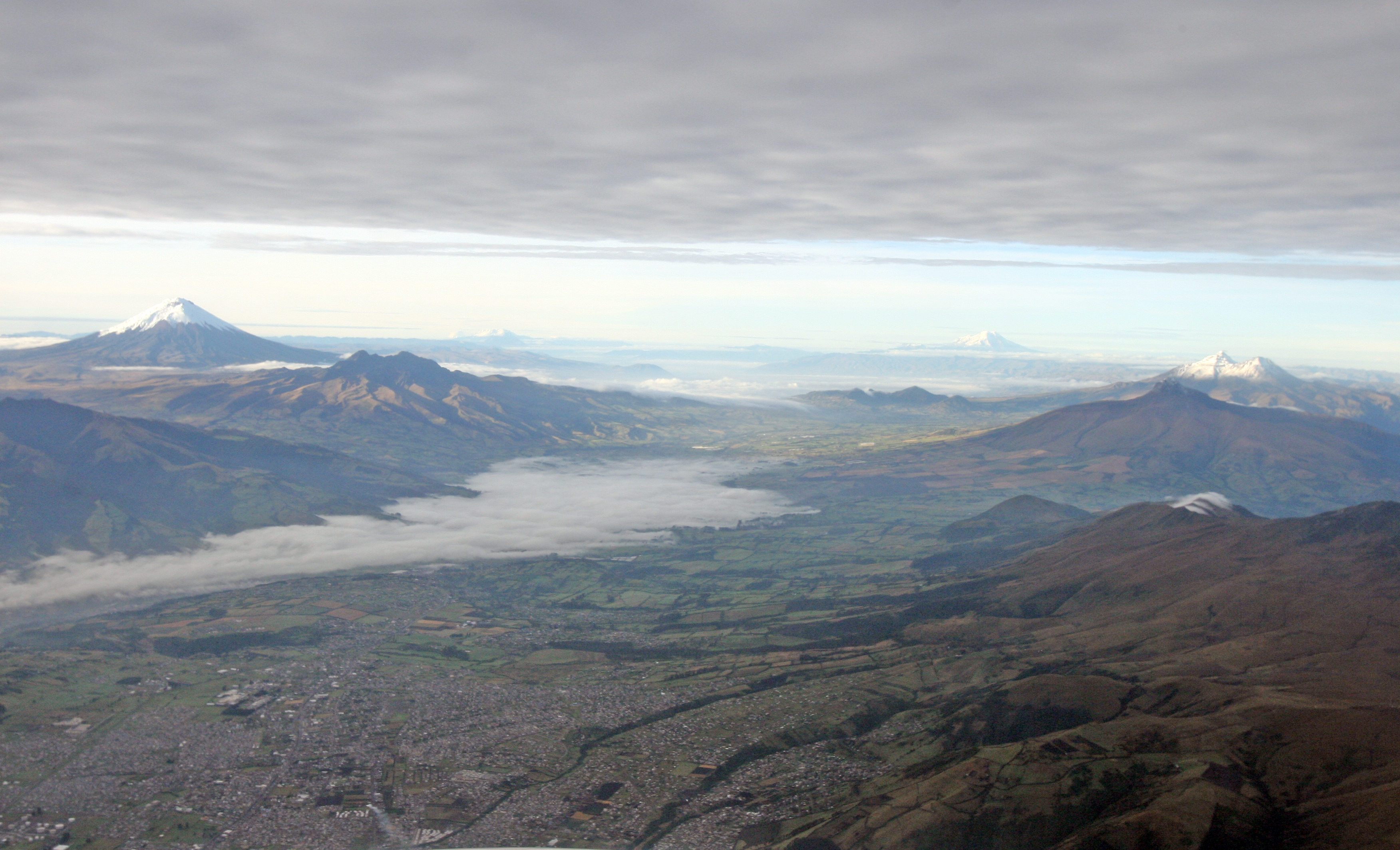 Avenida de los volcanes